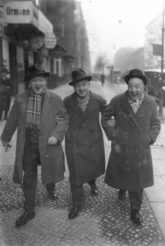 Die drei Fratellinis, die weltbrühmten Clowns wieder in Berlin! Die weltberühmten drei Fratellinis beim Spaziergang in den Strassen Berlins. Information added by Wikimedia users.The three Fratellini brothers